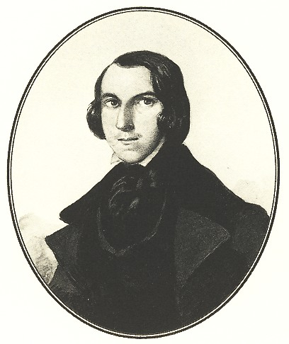 Aquarellzeichnung von Walther von Goethe